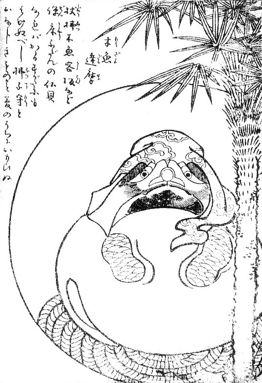 Mokugyo-daruma (木魚達磨) from the Gazu Hyakki Tsurezure Bukuro (百器徒然袋)